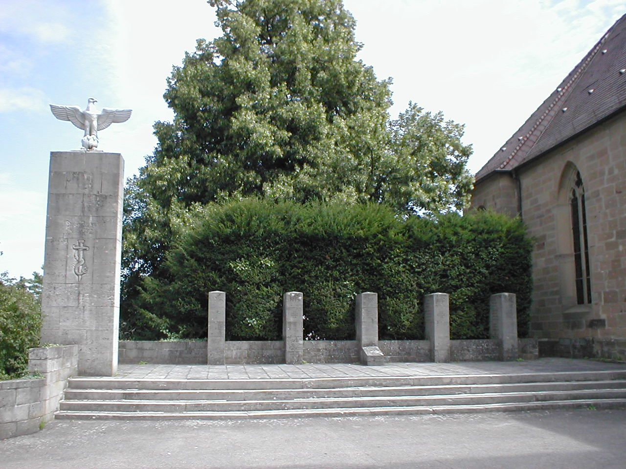 Krieger-Ehrenmal von 1938 hinter der Albanskirche in Heilbronn-Frankenbach